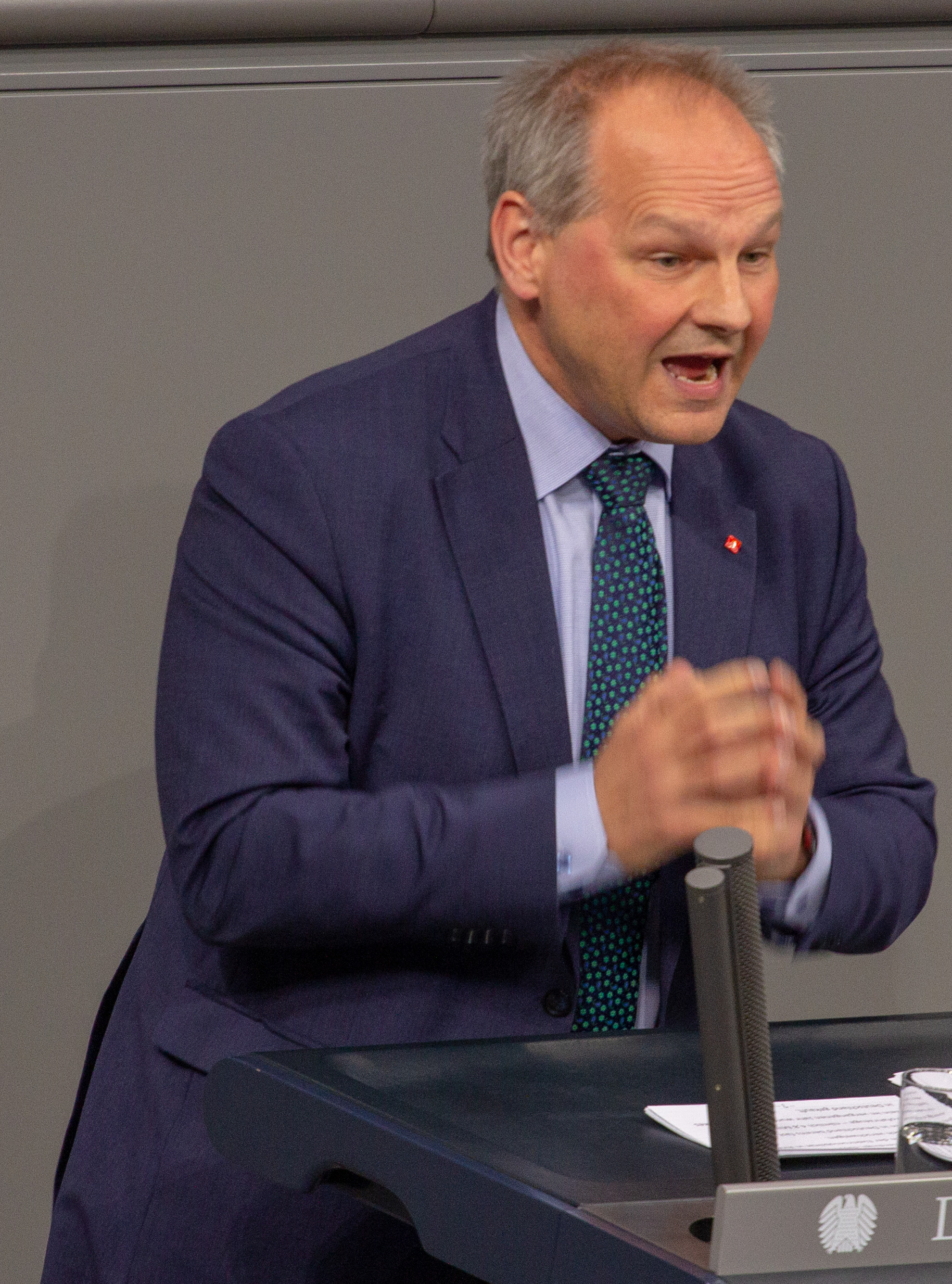 Mathias Stein, Mitglied des Deutschen Bundestages, während einer Plenarsitzung am 11. April 2019 in Berlin.